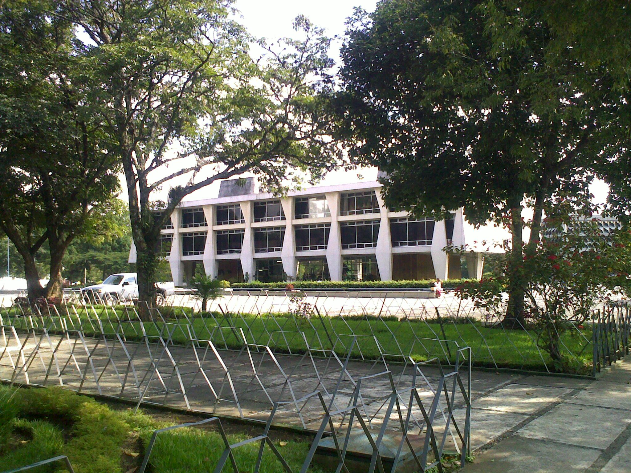 Edificio Rectoría Universidad de San Carlos de Guatemala